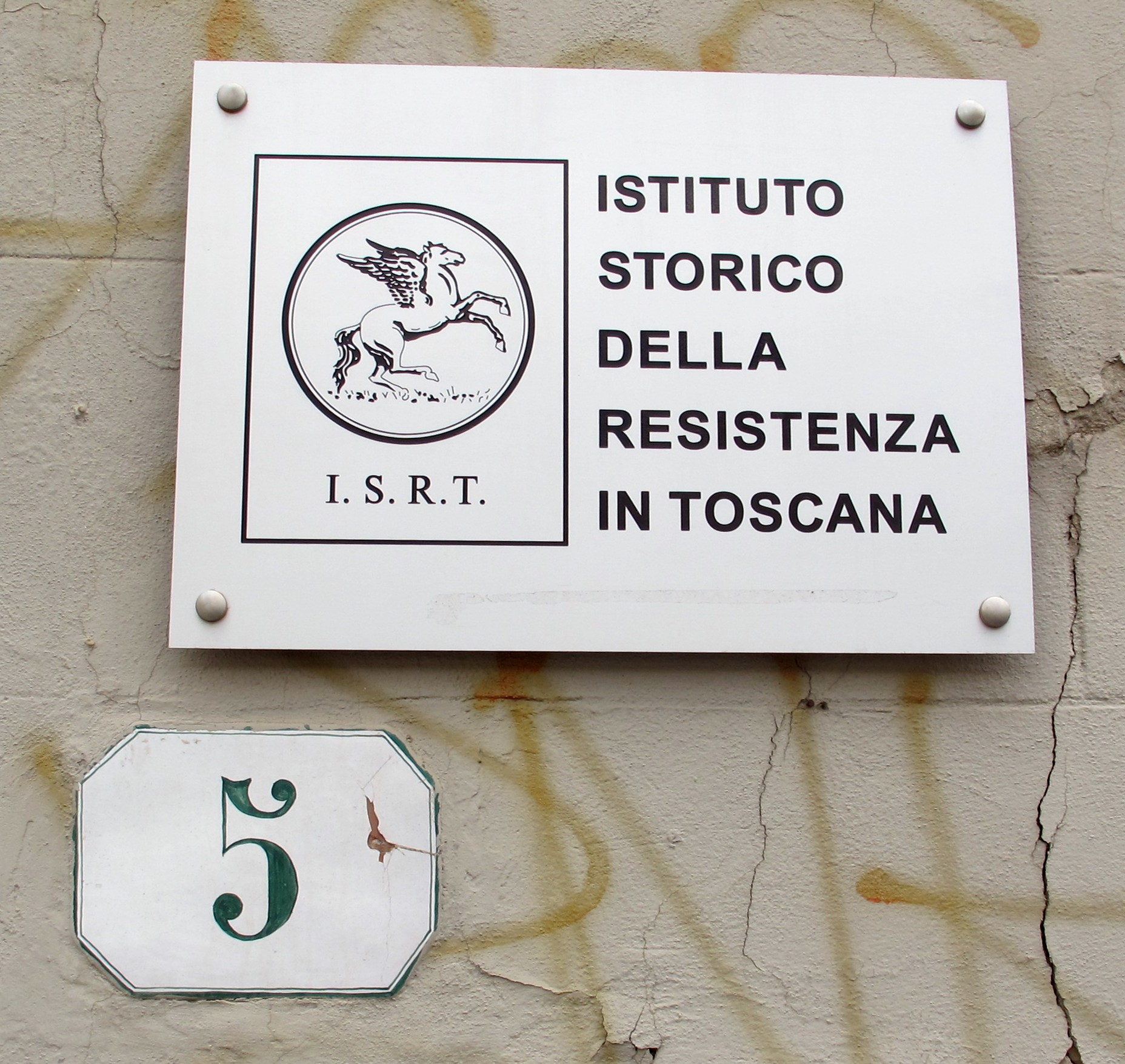 Via carducci 5, sede dell'istituto storico della resistenza in toscana